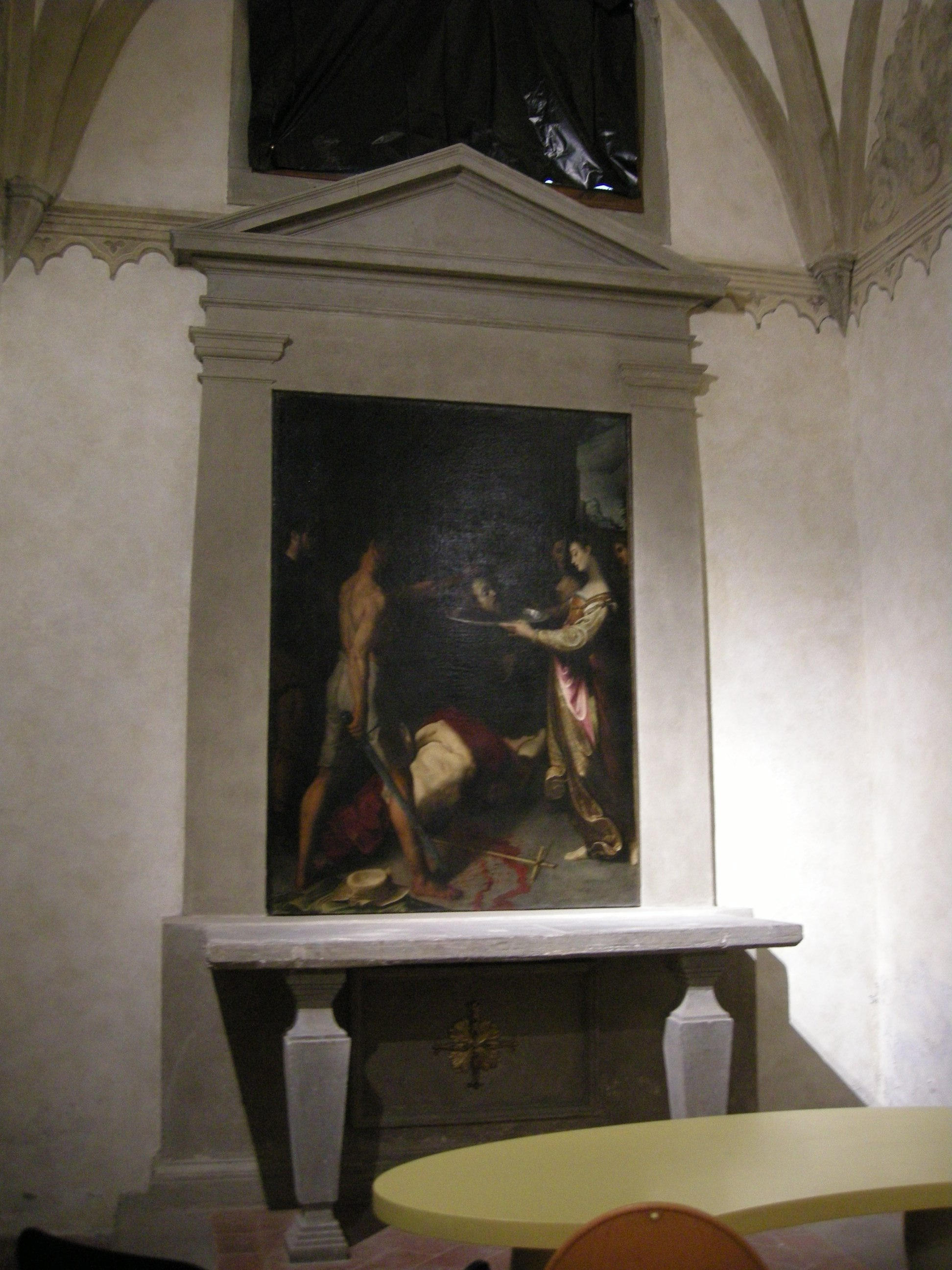 Firenze, san jacopo in campo corbolini, interno, san giovanni decollato